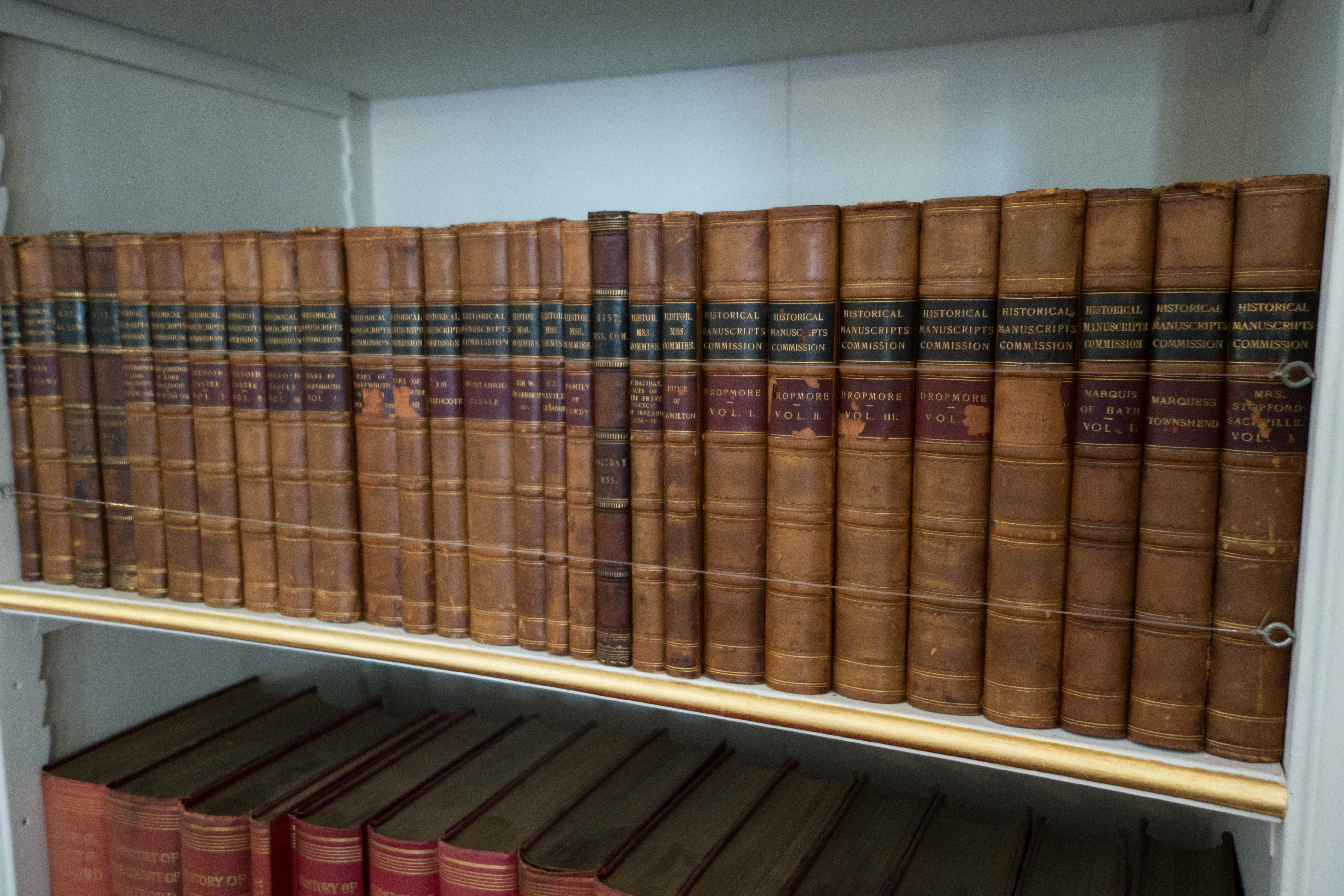 Kenwood House, London, 2017